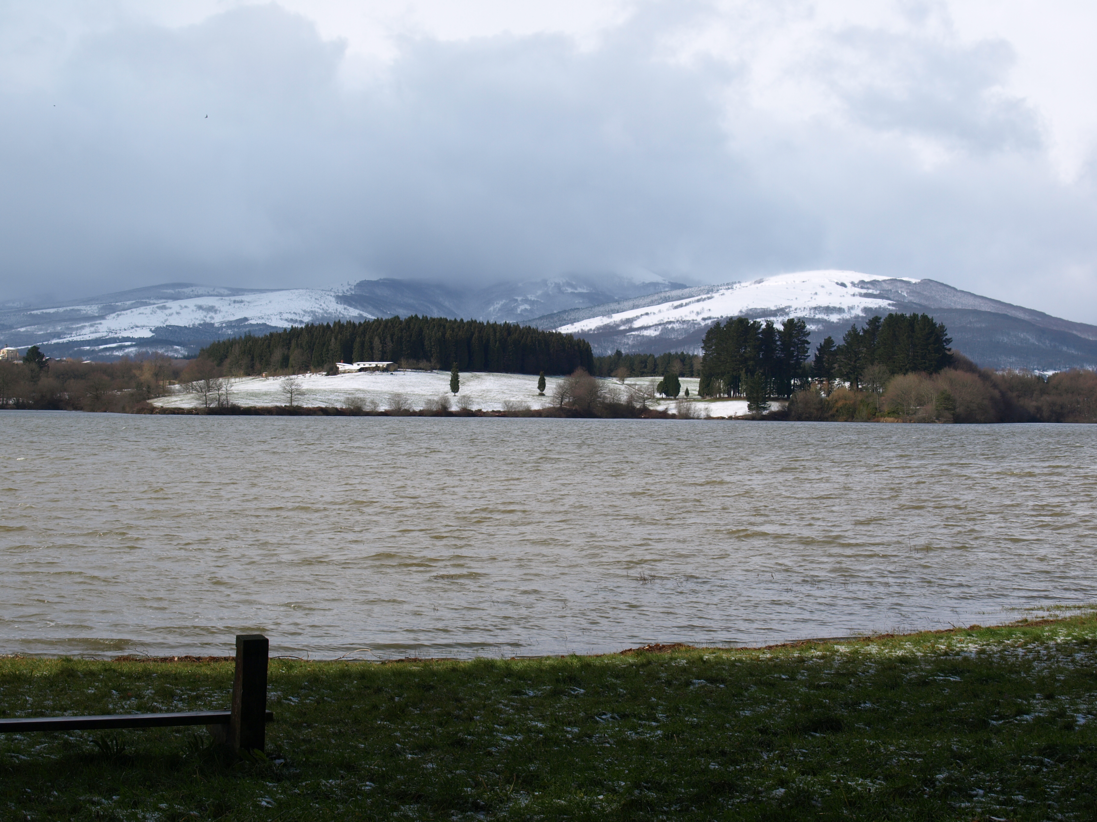 Monte Gorbea al fondo Embalses del sistema del Zadorra This is a photography of a Site of Community Importance in Spain with the ID: ES2110011. Natura2000 entry, EEA entry